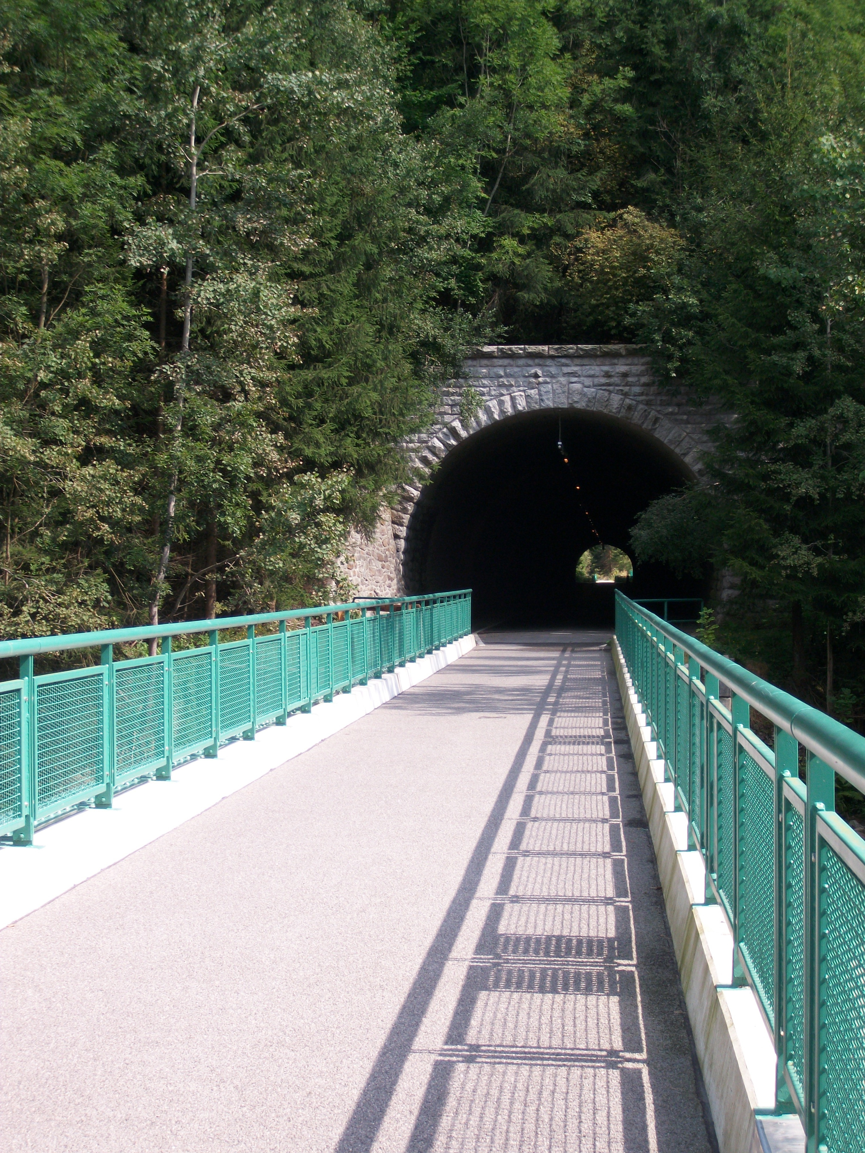 Bockauer Tunnel mit Mulderadweg (2013)